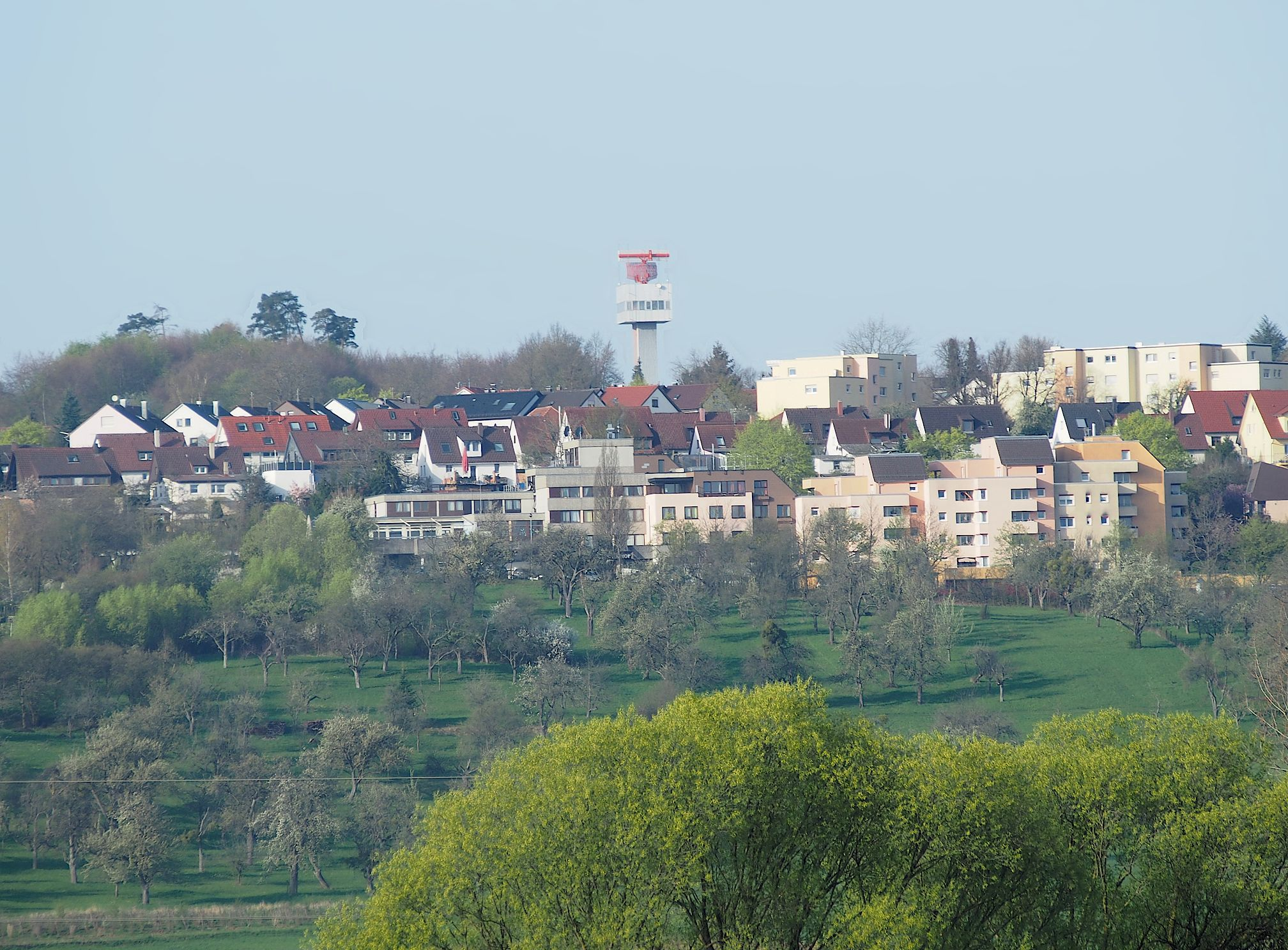 Stetten auf den Fildern von Bernhausen gesehen